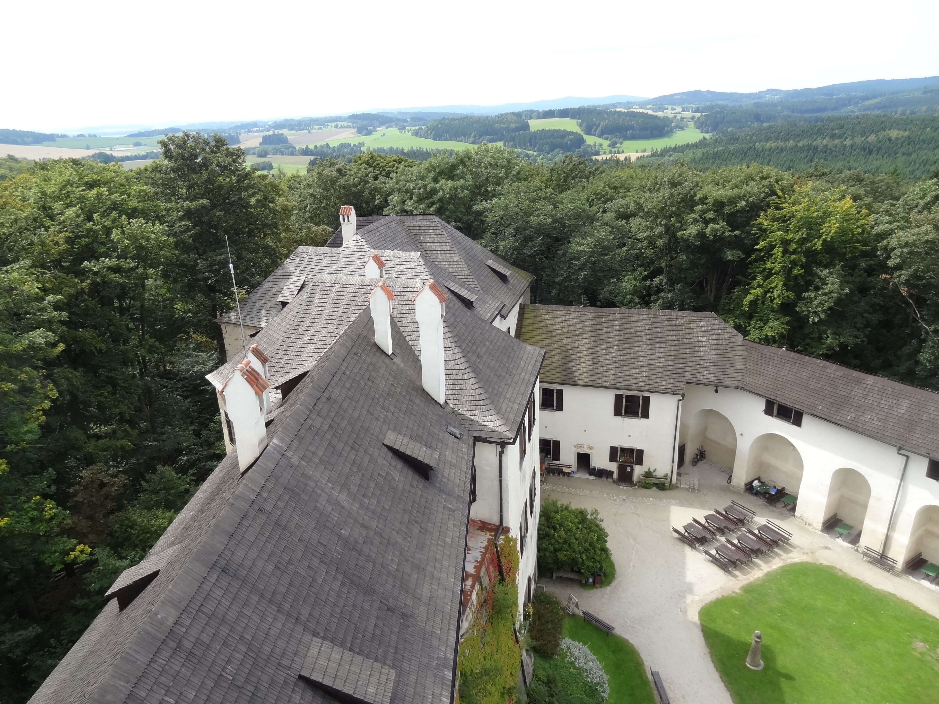 Roštejn, Doupě 1, Doupě (okres Jihlava).